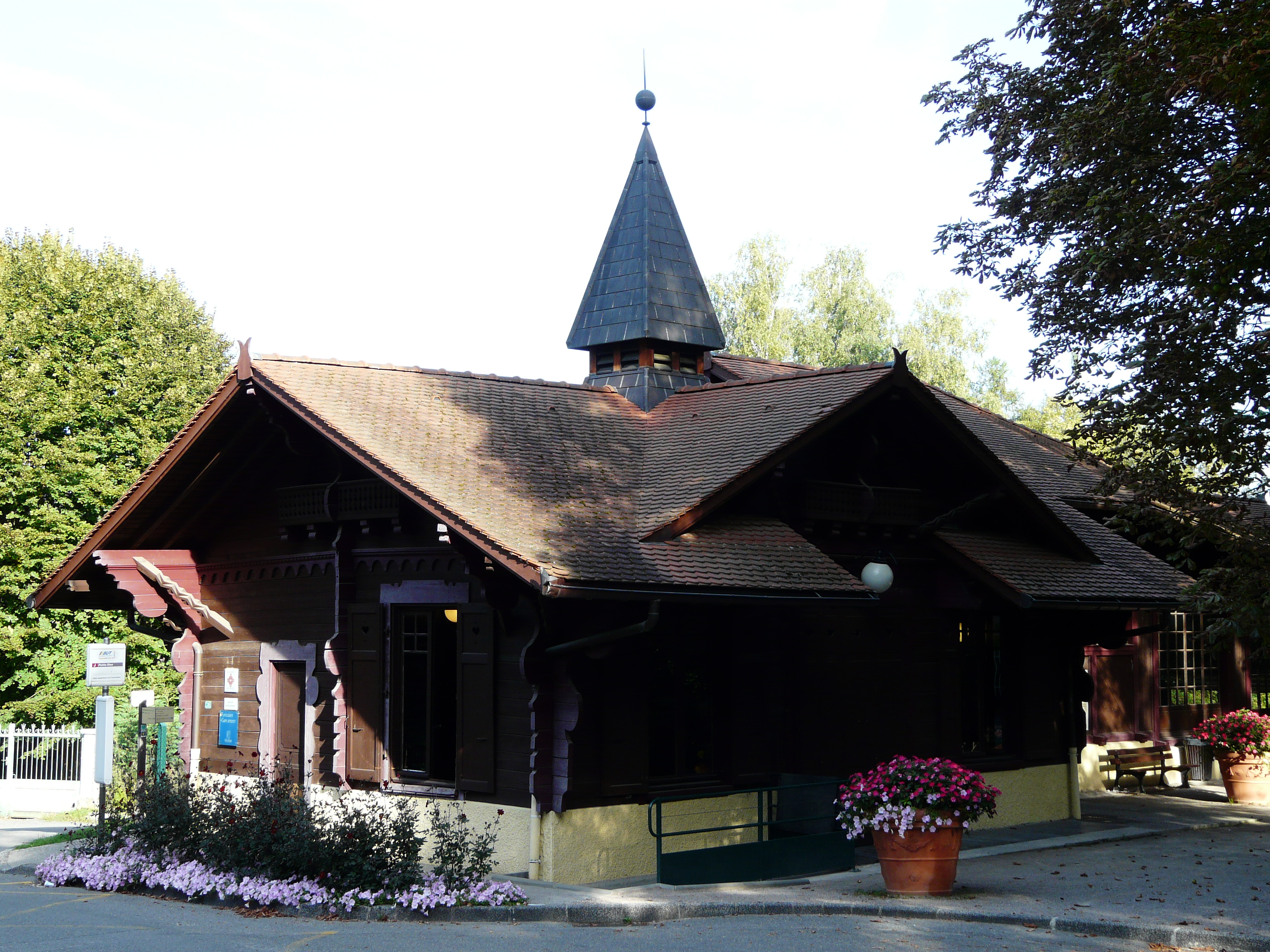 Gare supérieure du funiculaire d'Evian, à Neuvecelle